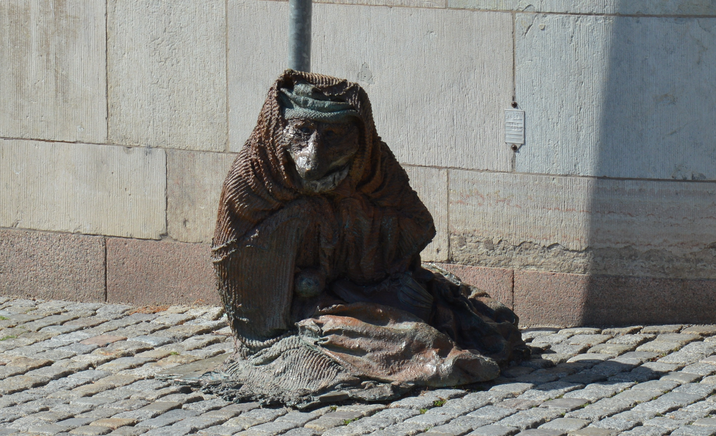 Skulptur Stockholm Fuchs